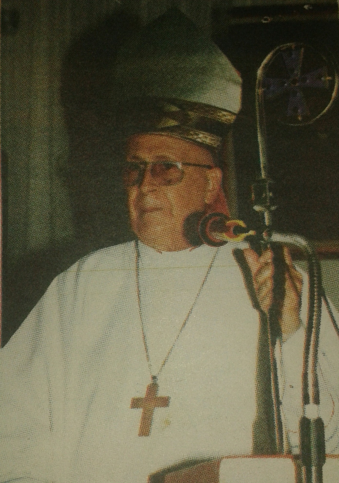 foto oficial